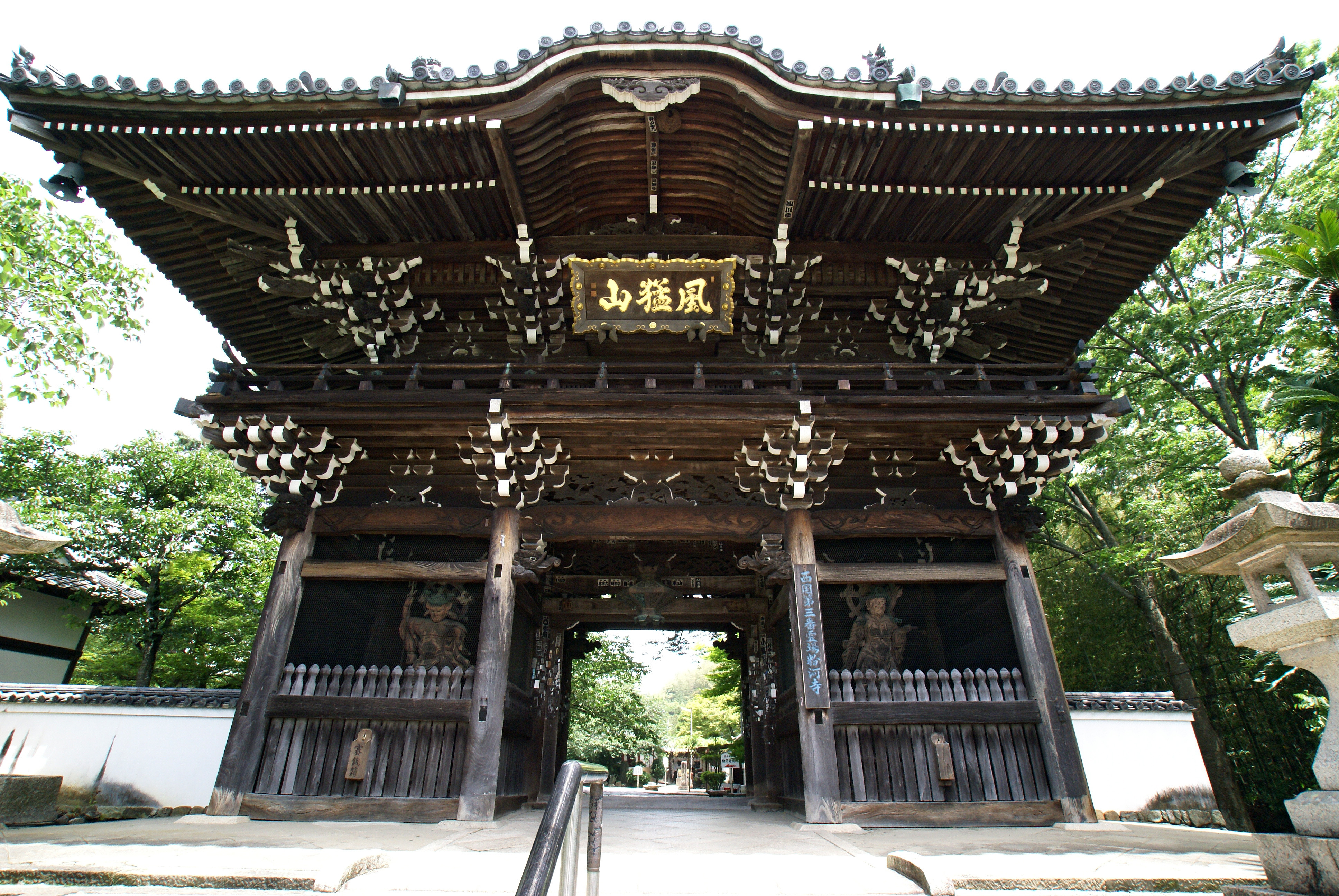 Kokawa-dera in Kinokawa, Wakayama prefecture, Japan